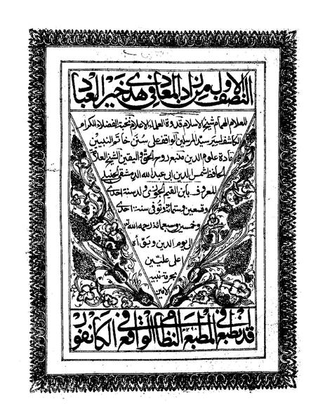 النص الأول من زاد المعاد في هدى خير العباد